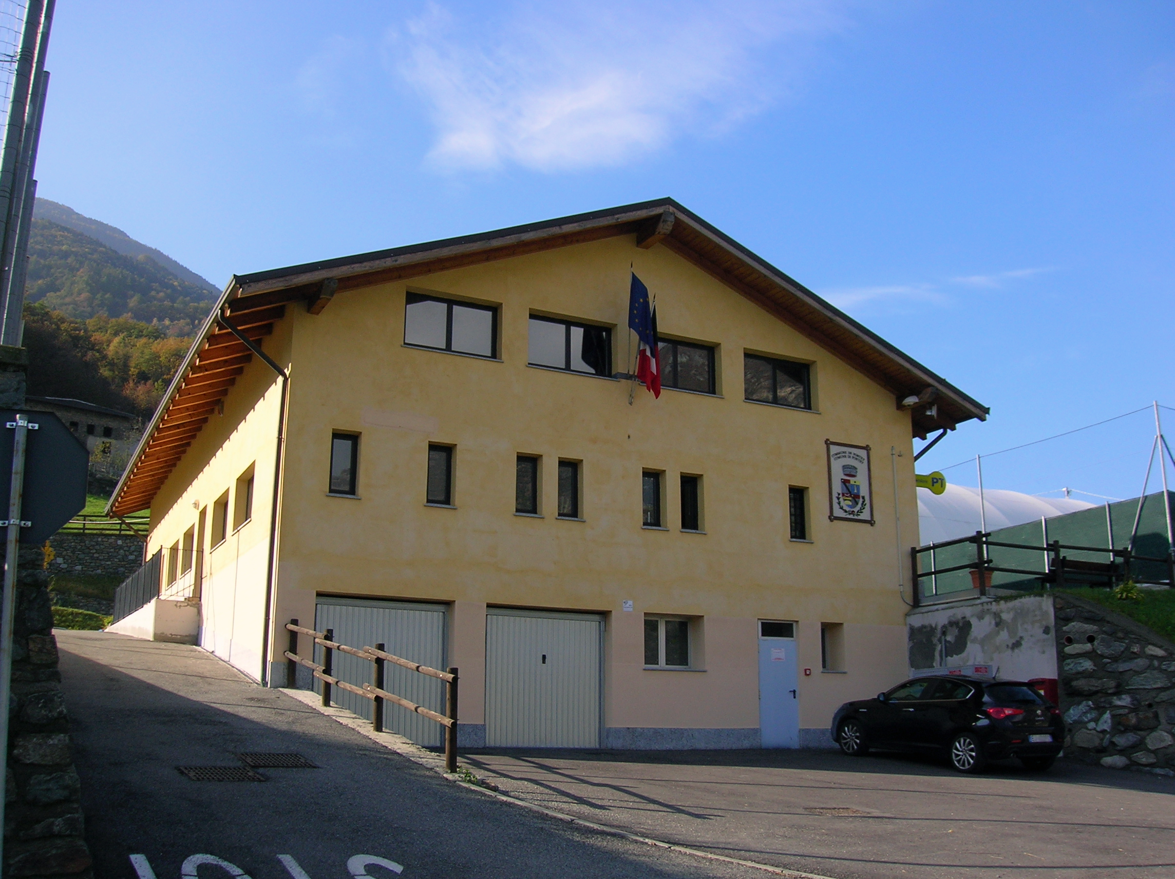 Pontey, Valle d'Aosta, Italia.